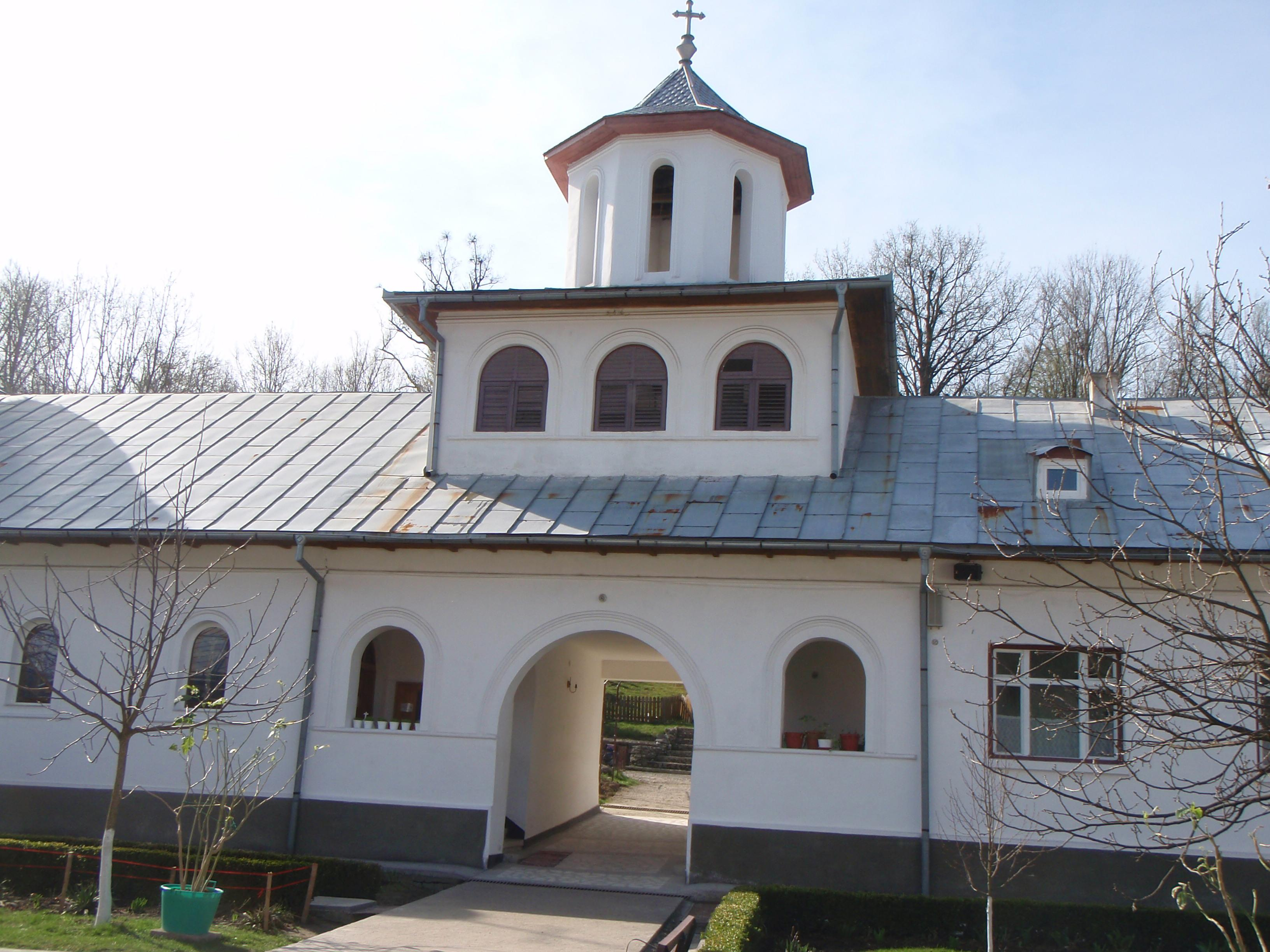 Intrare Mănăstirea Sfânta Treime (Strâmba)